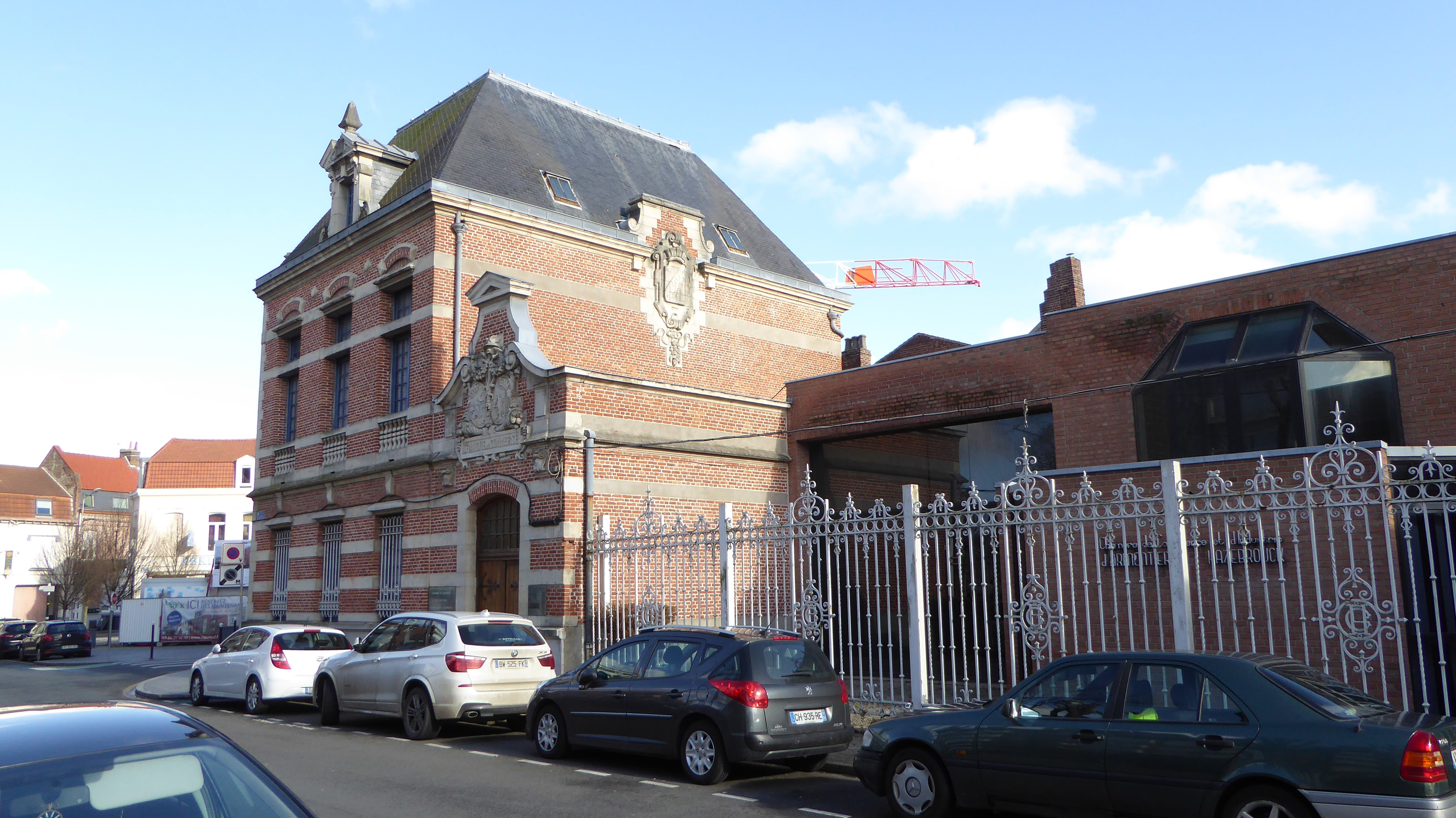 Chambre de commerce et d'industrie à Armentières Nord, France